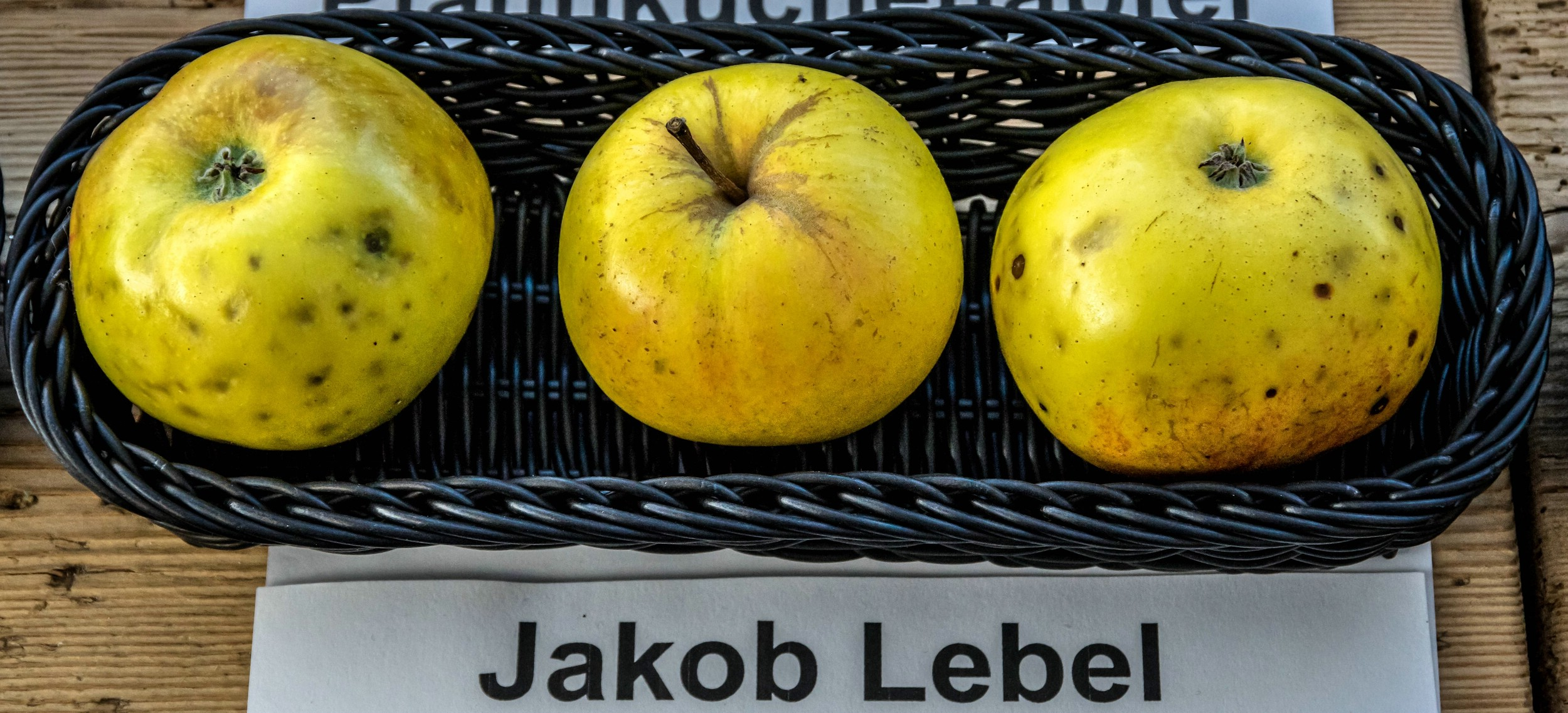 Alte Apfelsorten, von denen es im Badischen noch tragende Bäume gibt. Alle Aufnahmen au dem Oktober 2015